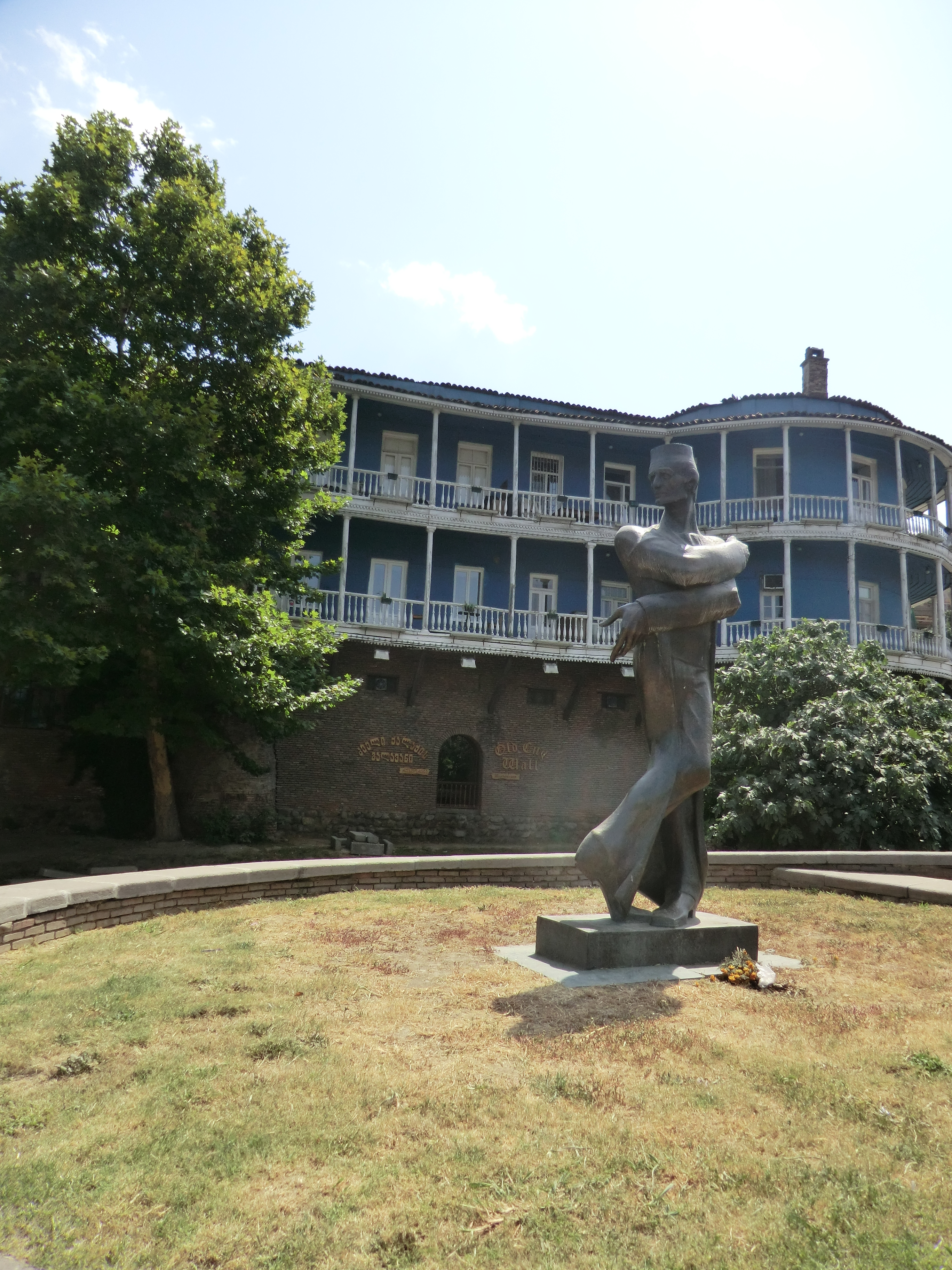 Dzveli Tbilisi, Tbilisi, Georgia